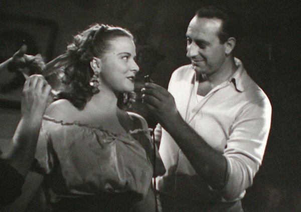 Alida Valli e il direttore della fotografia Romolo Garroni sul set cinematografico